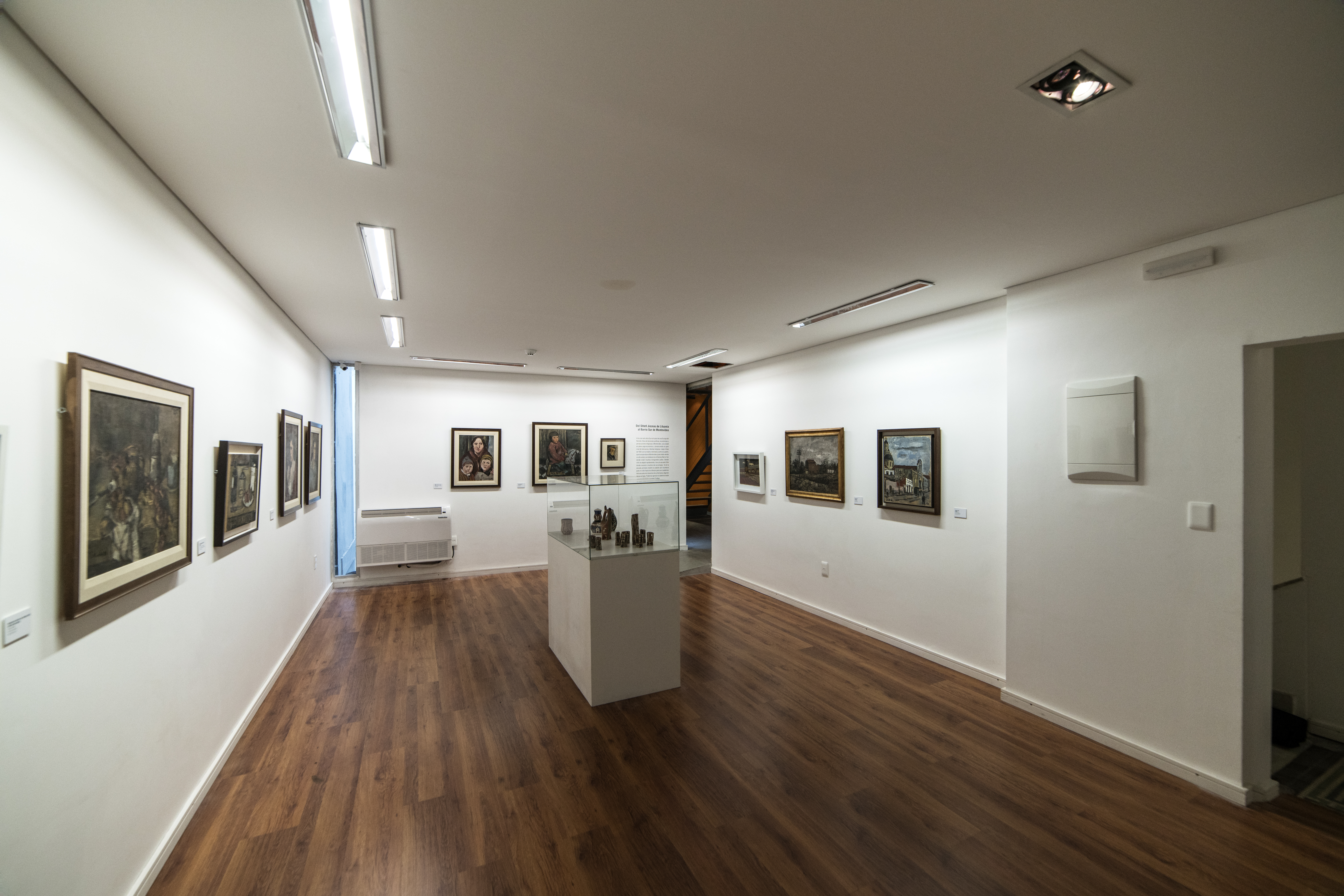 Fotografía del Museo Gurvich tomada por Alvaro Zinno